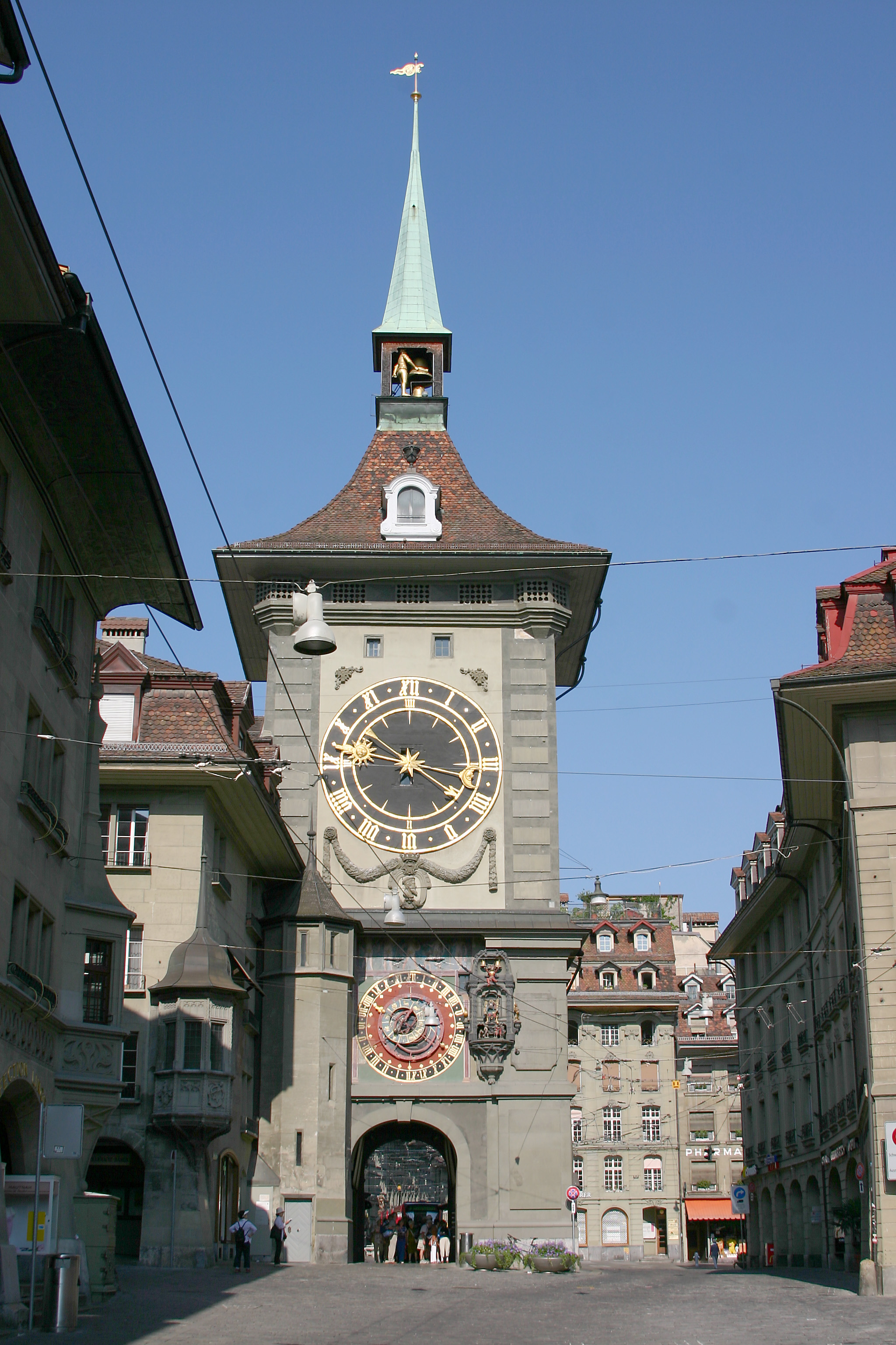 Zytglogge (Clocktower), Bern, Switzerland